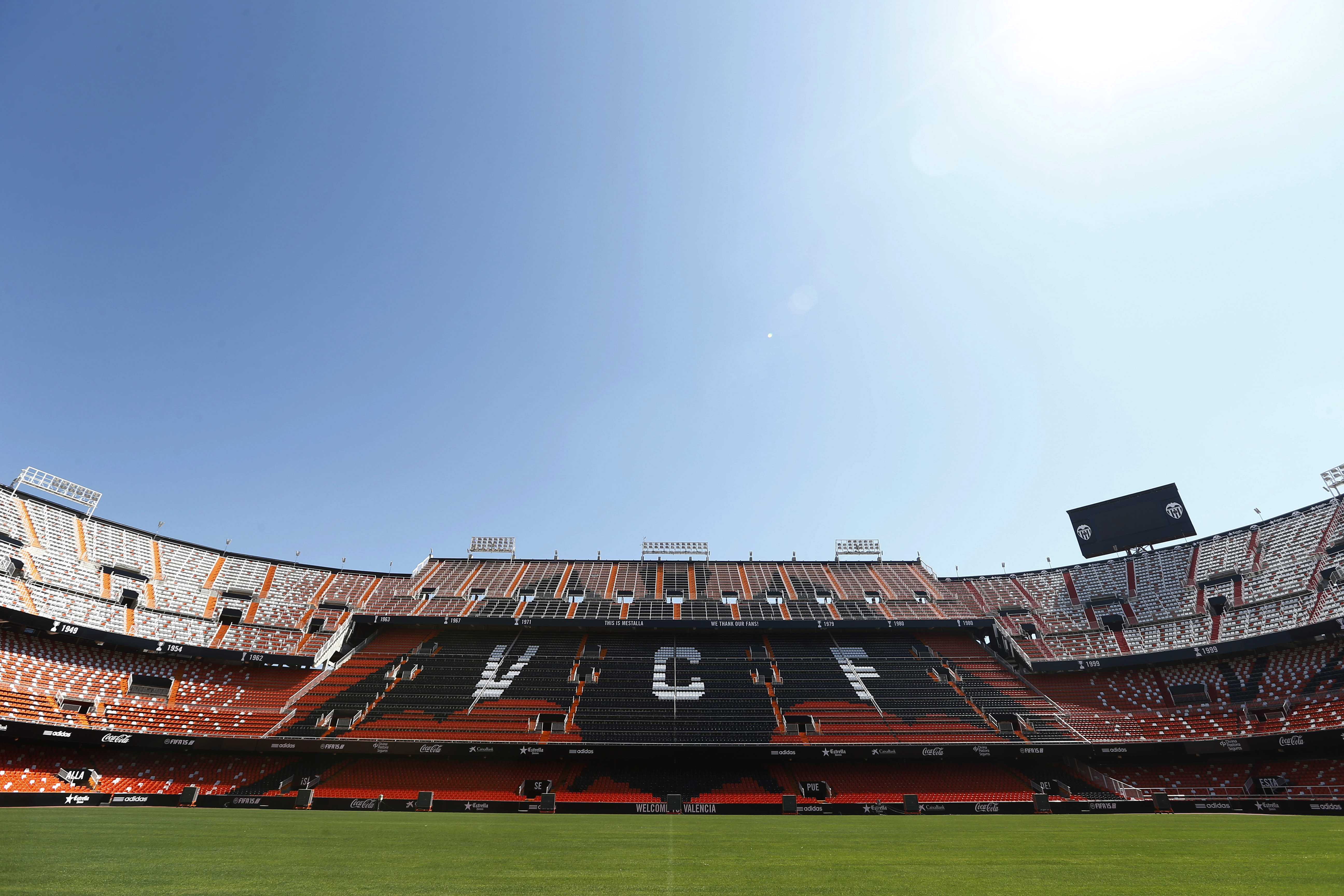 Un Murciélago de 90 metros y el color naranja, se convierte en protagonista del estadio desde 2013.